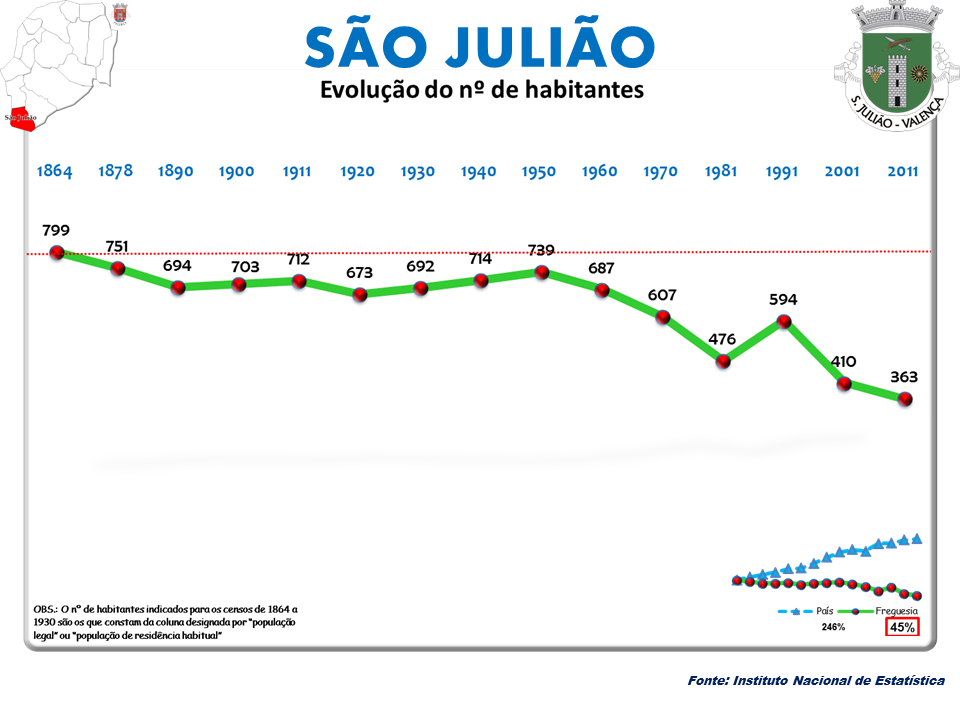 Censos 1864/2011